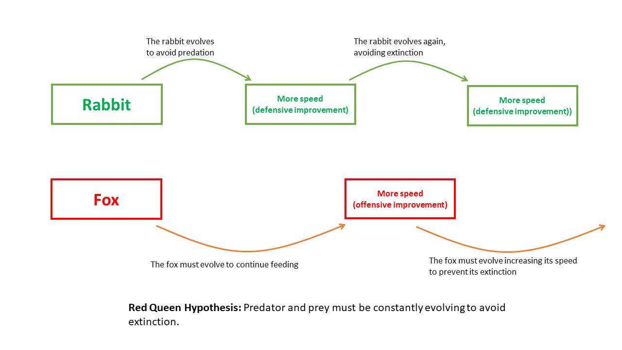 Predator-prey relationship between rabbits and foxes following the principle of the Red Queen hypothesis. The rabbit evolves increasing its speed to escape the attack of the fox, and the fox evolves increasing its speed to reach the rabbit. This evolution is constant, in case one of the two stops evolving, its extinction will occur.